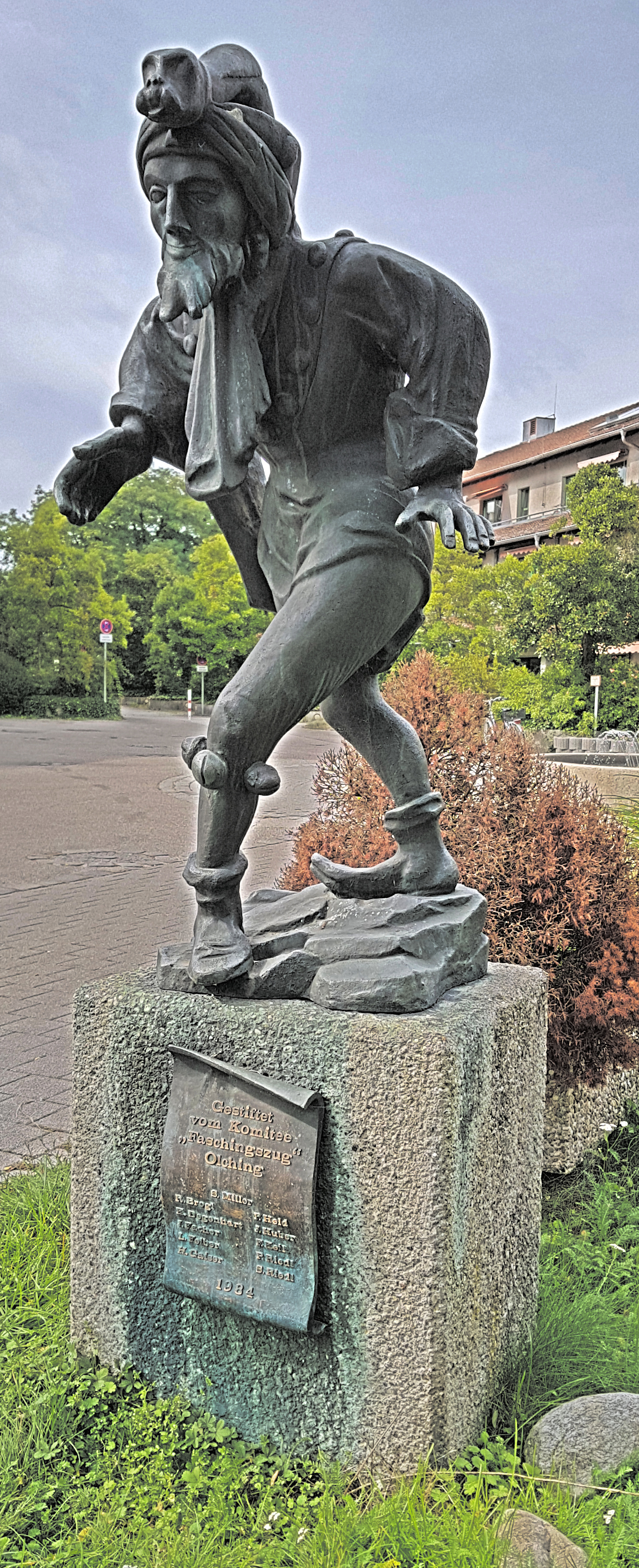 Deutschland, Bayern, Landkreis Fürstenfeldbruck, Gemeinde Olching, Moriskentänzerskulptur, gestiftet vom "Komitte Faschingszug Olching" im Jahr 1984 in Feurstr. 21, Nachempfunden: dem Moriskentänzer mit löwenbesetzter Mütze („Zauberer“) von Erasmus Grasser, 1480, Größe der Figur mit Sockel etwa 2,20 Meter